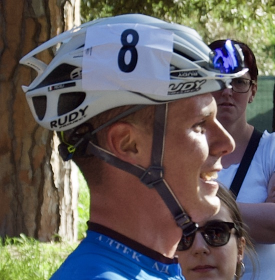 Alessandro Fedeli peu après l'arrivée du Gran Premio della Liberazione 2018.